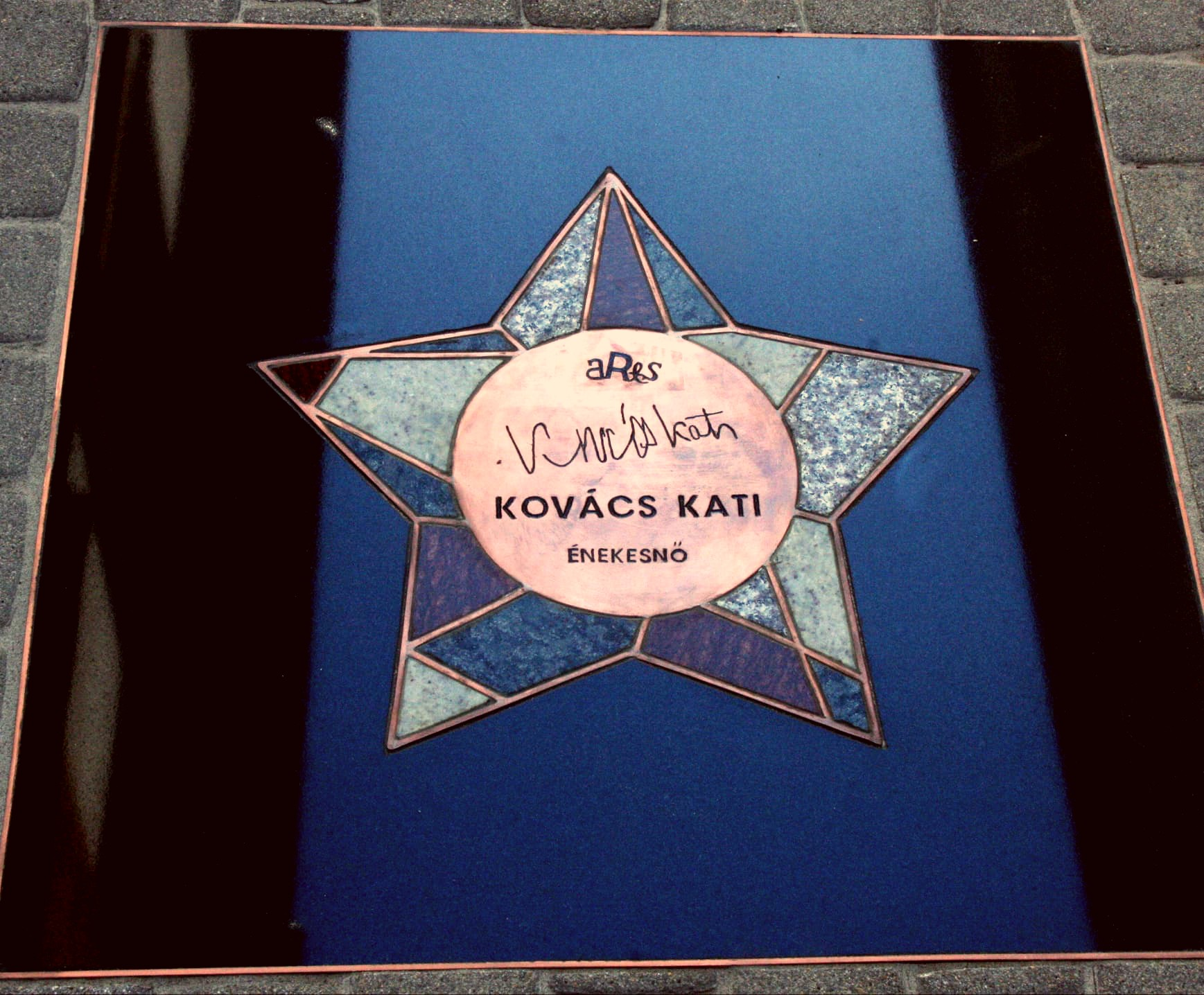 Hírességek Sétánya (Eger, Érsek utca) - Kovács Kati Kossuth-díjas énekesnőé az első Egri Csillag